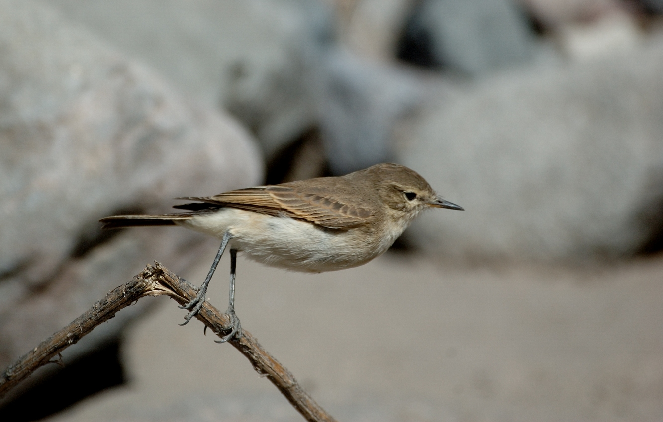 Spot-billed Ground-tyrant (Muscisaxicola maculirostris). Chiguata, Arequipa, Peru 17.06.08